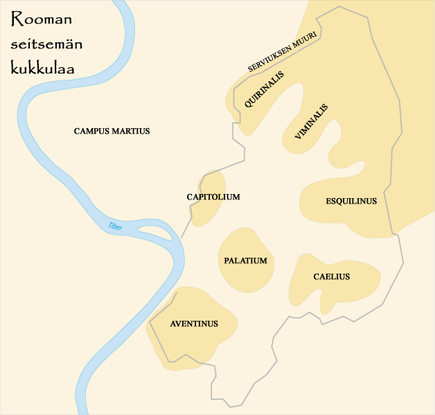 Rooman seitsemän kukkulaa